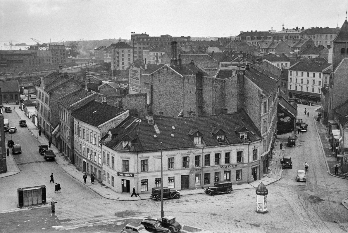 Fra Vika, september 1938. Gården i forgrunnen har adresse Bakkegata 21. Til høyre for den går Klingenberggata forbi Pipervikskirken til Munkedamsveien (med Munkedamsveien 17 som fondmotiv). Til venstre går Holmengata (Holmens gate).